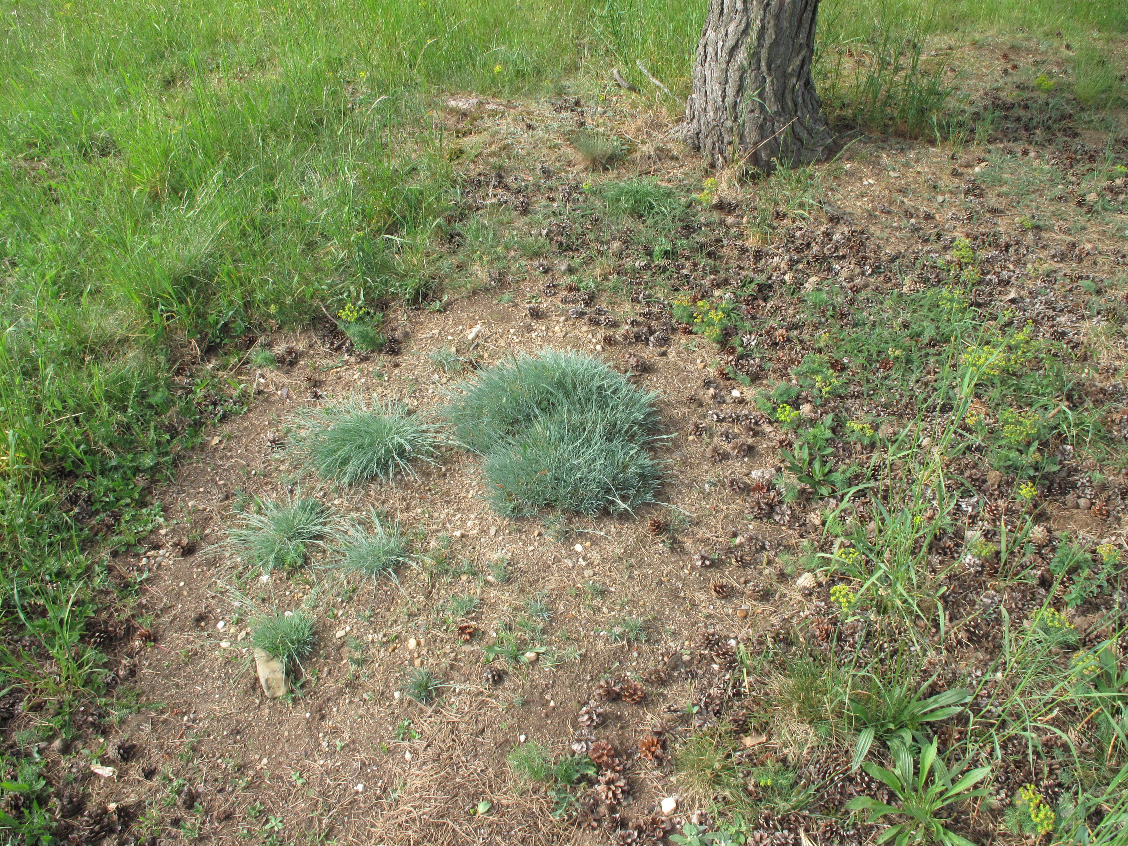 Trsy hvozdíku písečného českého (Dianthus arenarius subsp. bohemicus) v národní přírodní památce Kleneč. Okres Litoměřice, Česká republika.